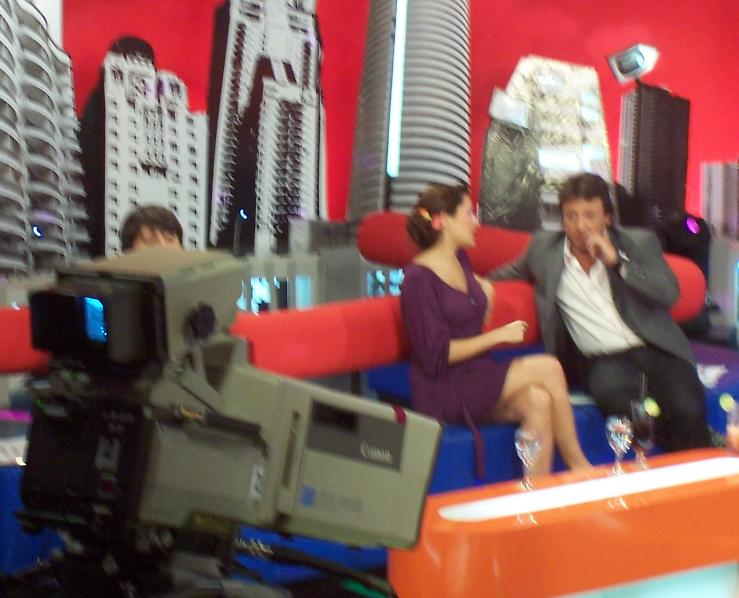 Majo Lozano y Claudio Pérez en RSM en los estudios de América Televisión en el barrio porteño de Palermo.